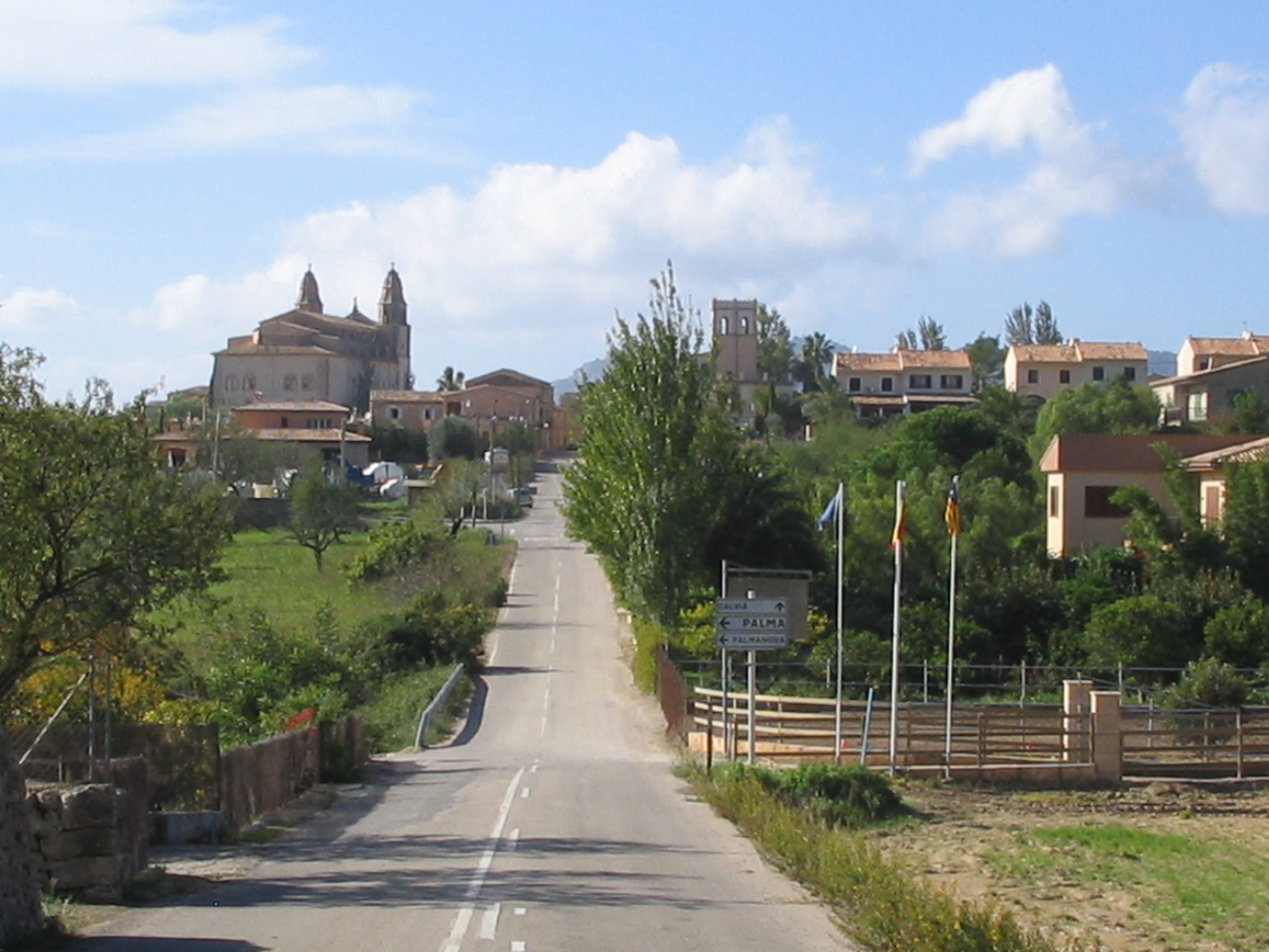 El pueblo Calviá en Palma de Mallorca.